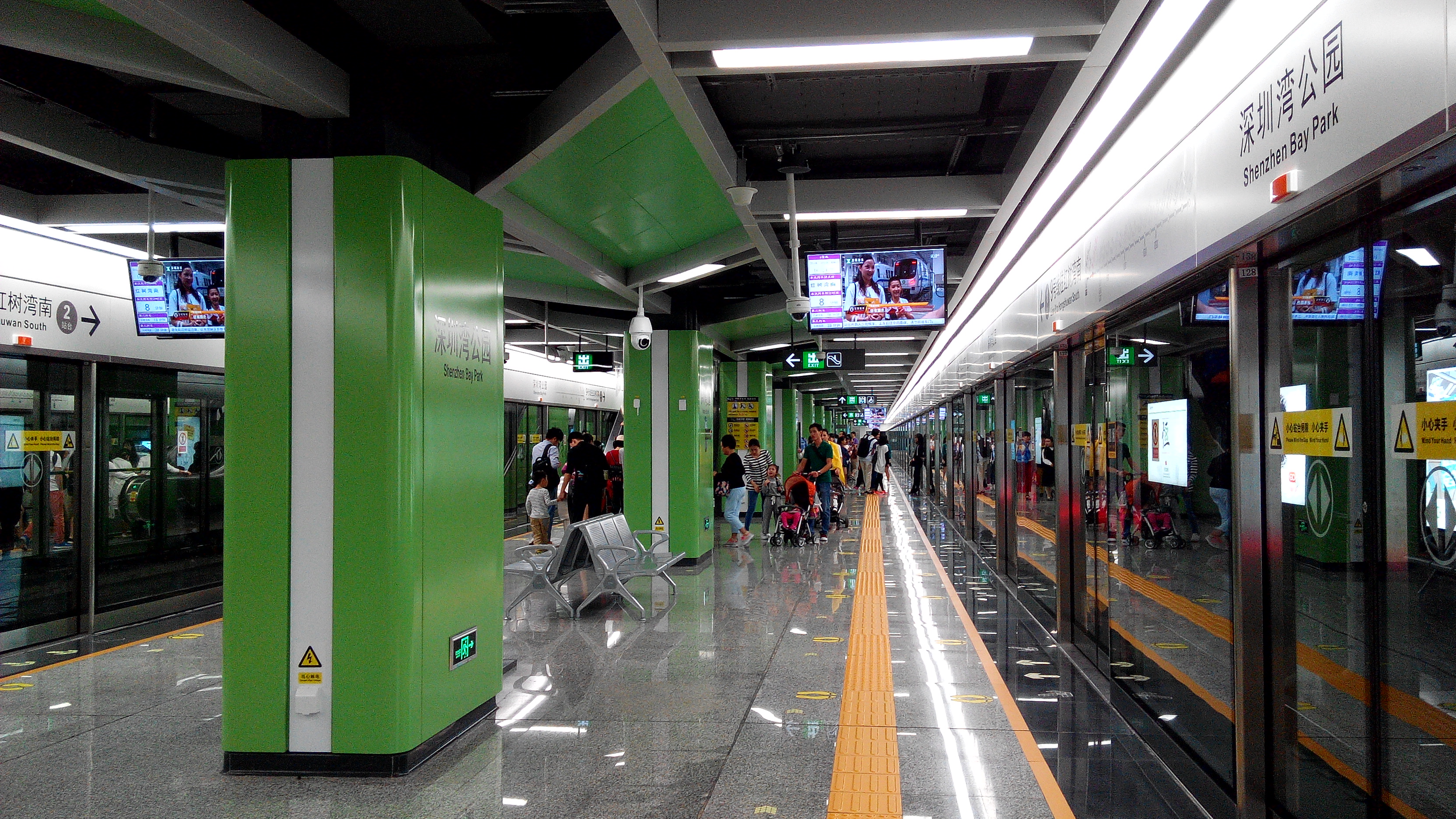 深圳地铁9号线 深圳湾公园站站台